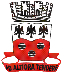 Brasão oficial de Garanhuns